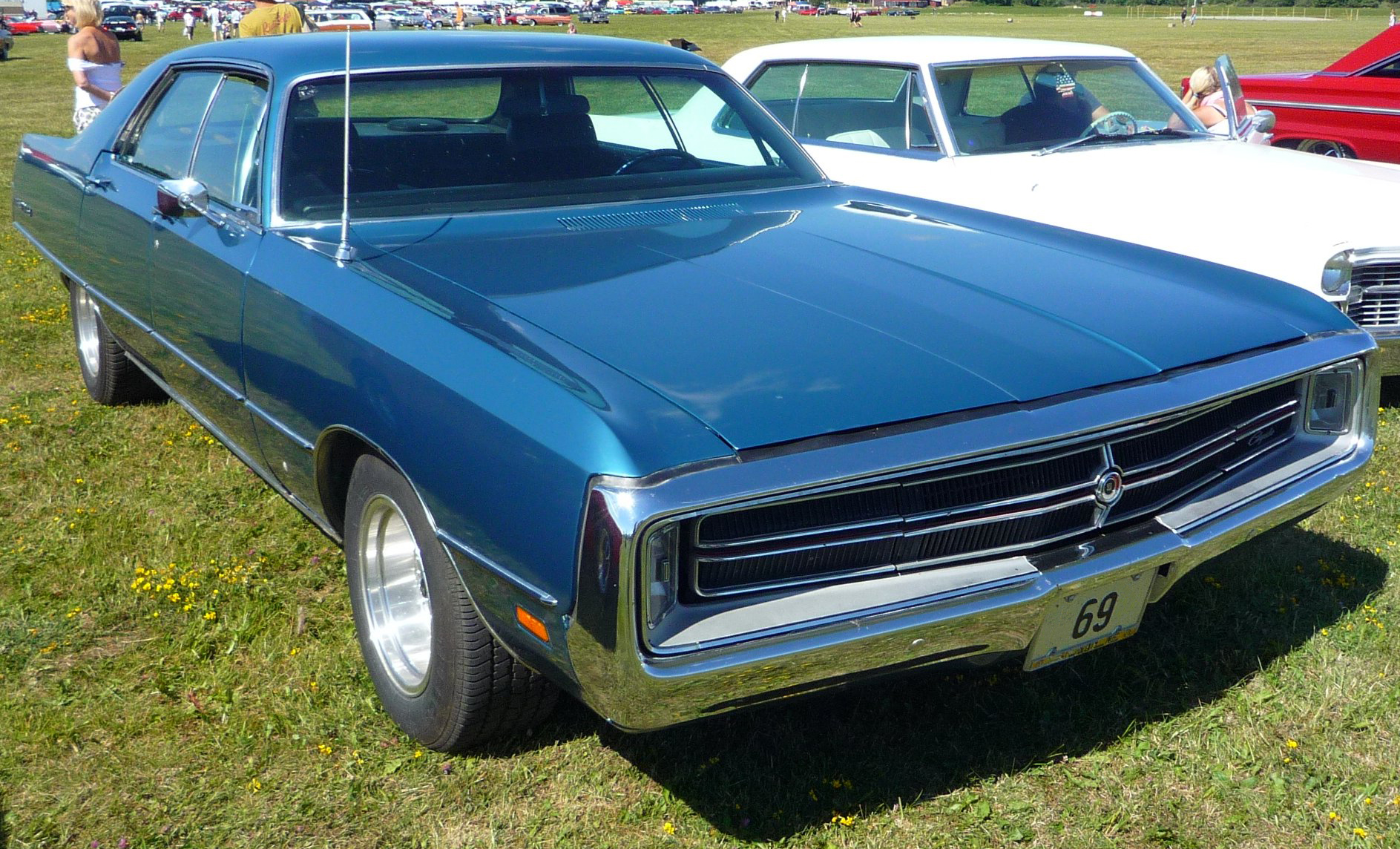 1969 Chrysler 300 4d HT sedan